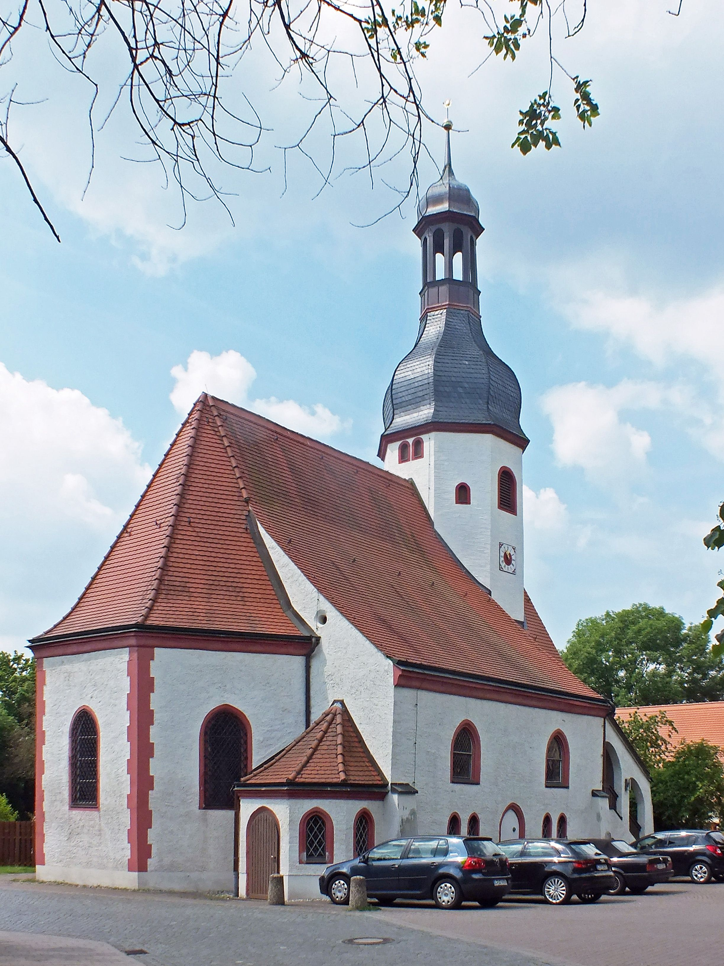 Die Auenkirche in Markkleeberg